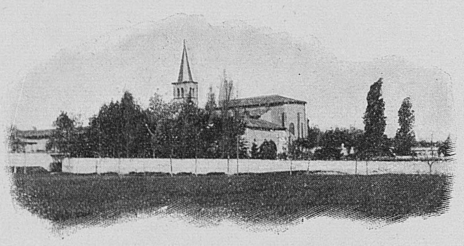 Dictionnaire illustré des communes du département du Rhône. Tome 1 / par MM. E. de Rolland et D. Clouzet.